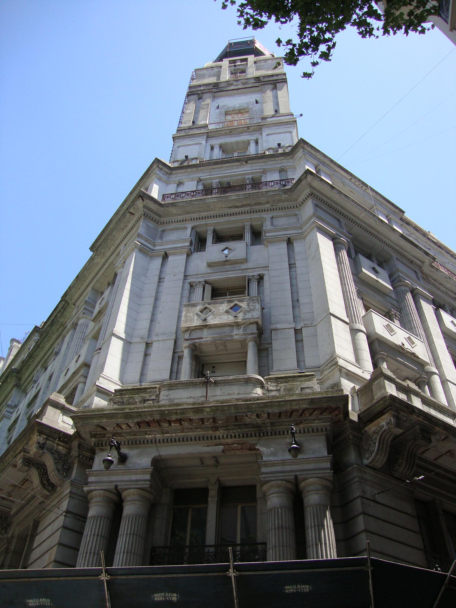 Torre del edificio del ex Hotel Majestic, actualmente AFIP. Avenida de Mayo nº 1301.